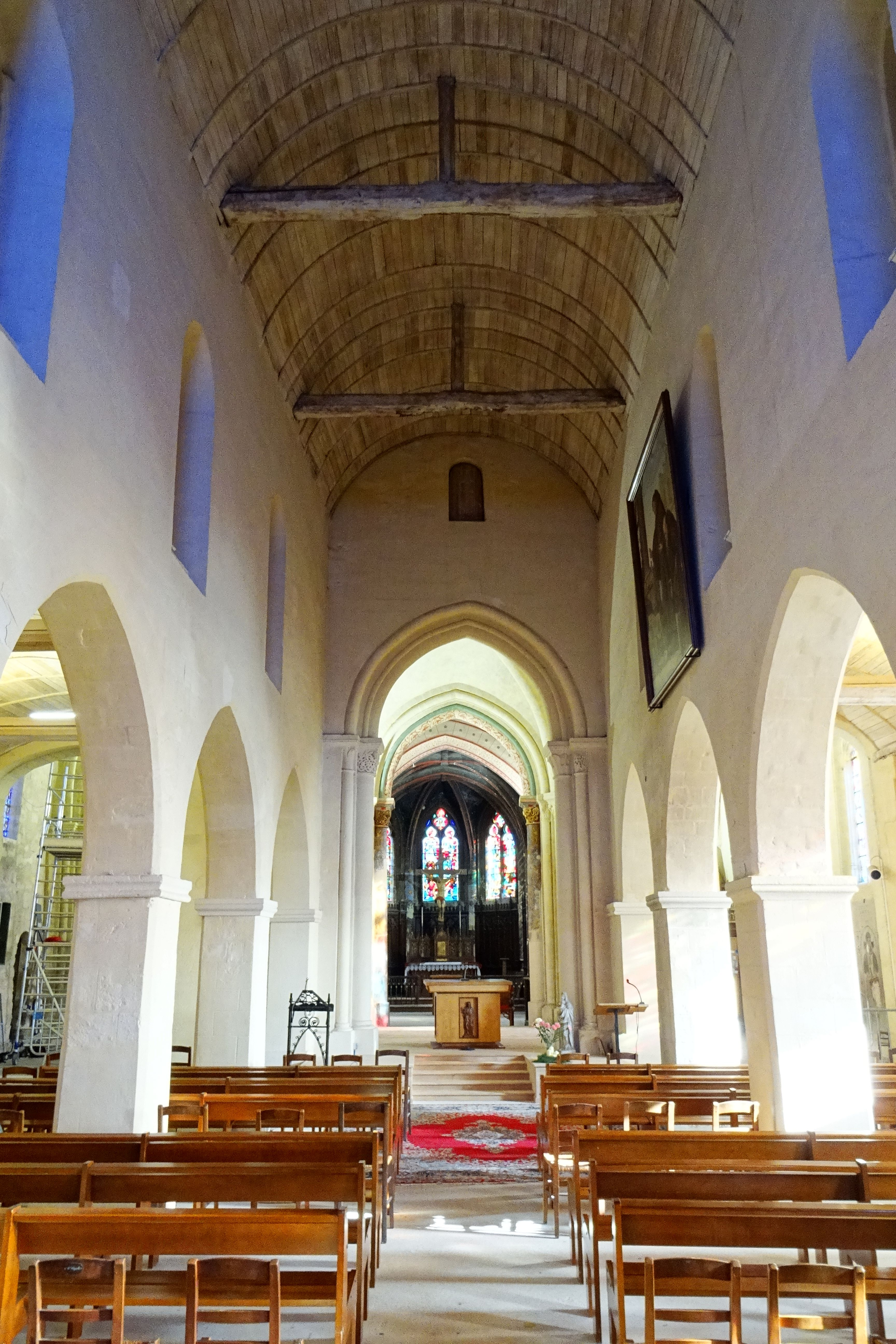 Intérieur de l'église - voir le titre du fichier.